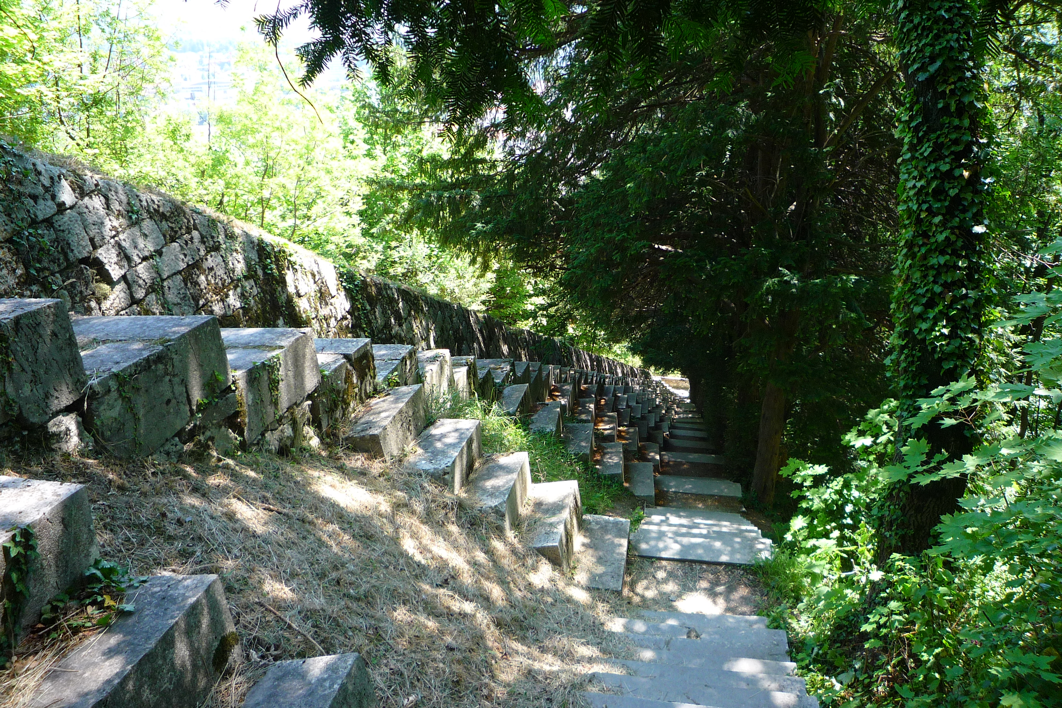 Escaliers (380 marches) des fortifications de la Bastille côté St Laurent - Grenoble